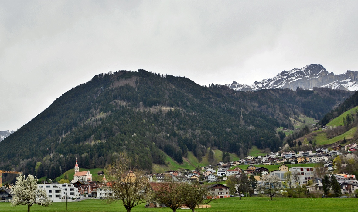 Schattdorf, Kanton Uri